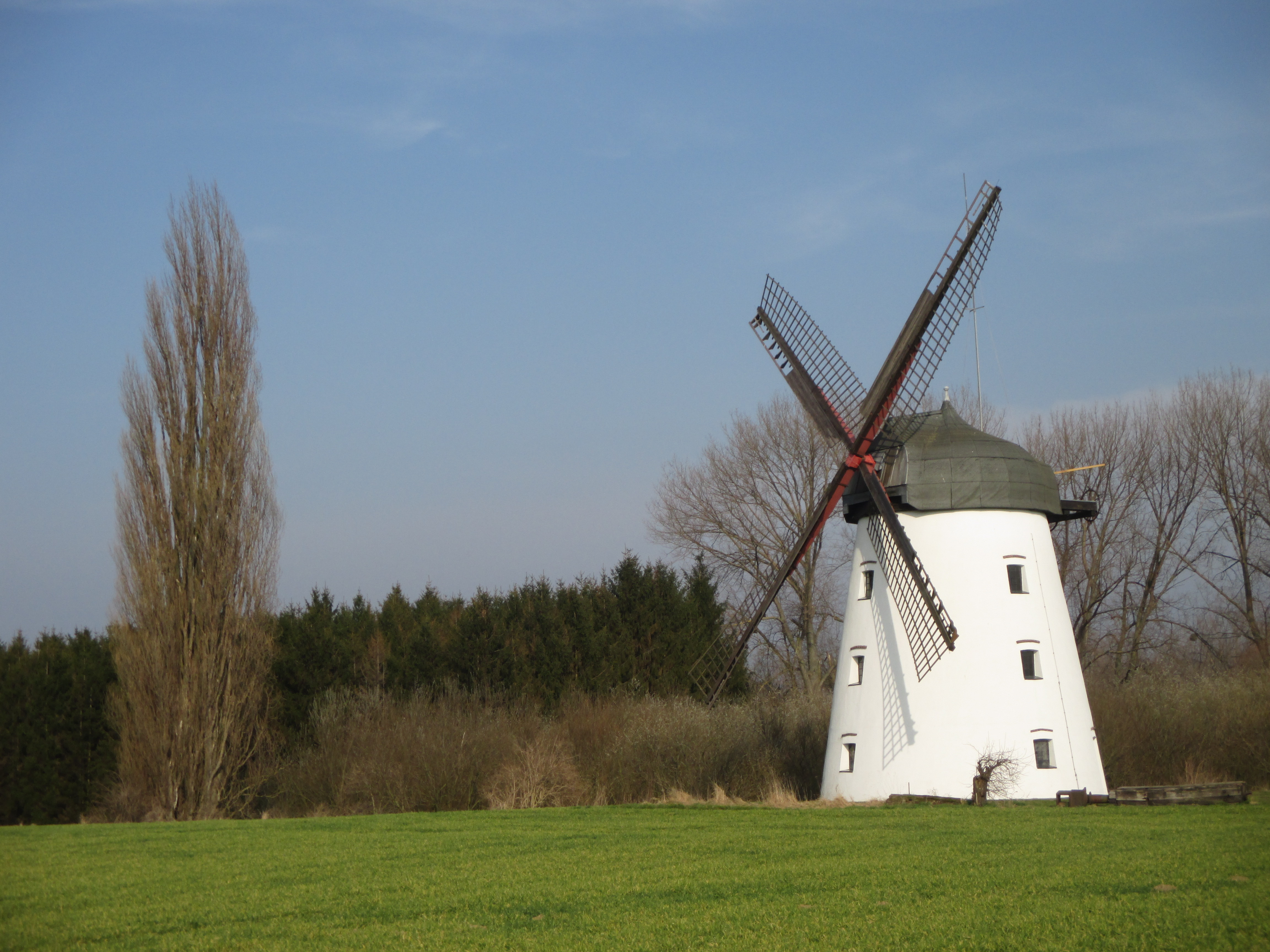 Windmühle am Bungenstedter Turm, Halcher, Stadt Wolfenbüttel